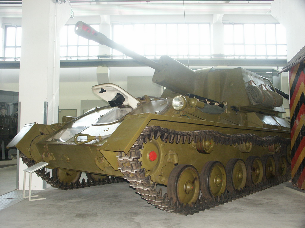 Bundeswehrmuseum Dresden mit Teilen von der NVA Remark: SU-76 assault gun.